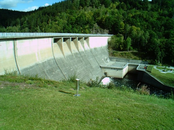 Talsperre Wendefurth aufgenommenvon Marian Szengel Bild steht unter der GNU-FDL